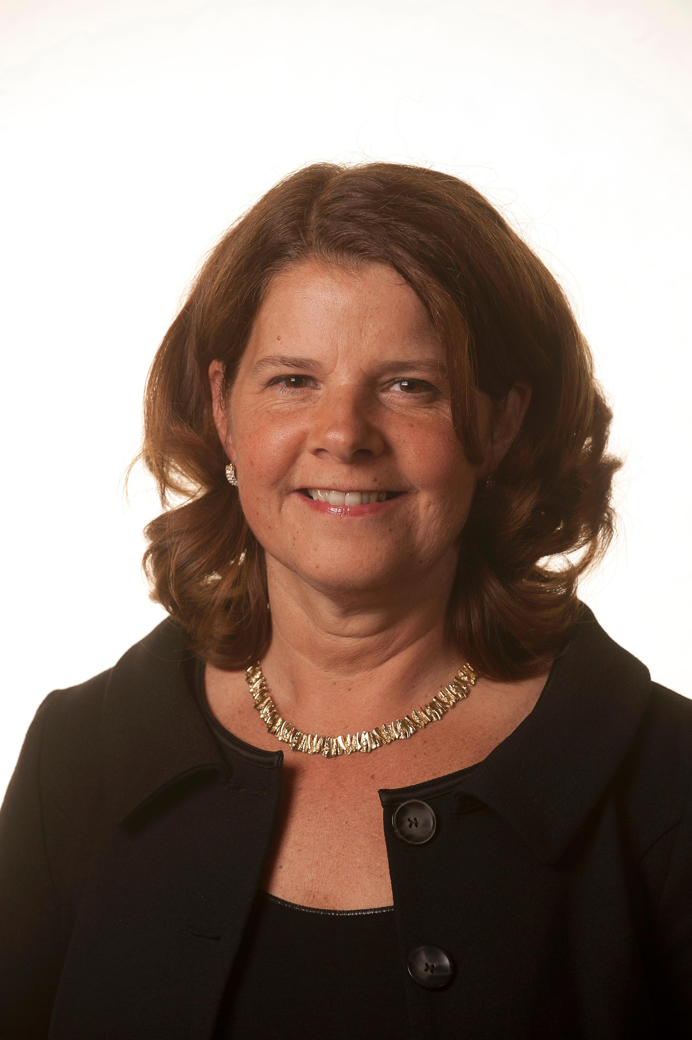 Minister van Onderwijs Marja van Bijsterveldt